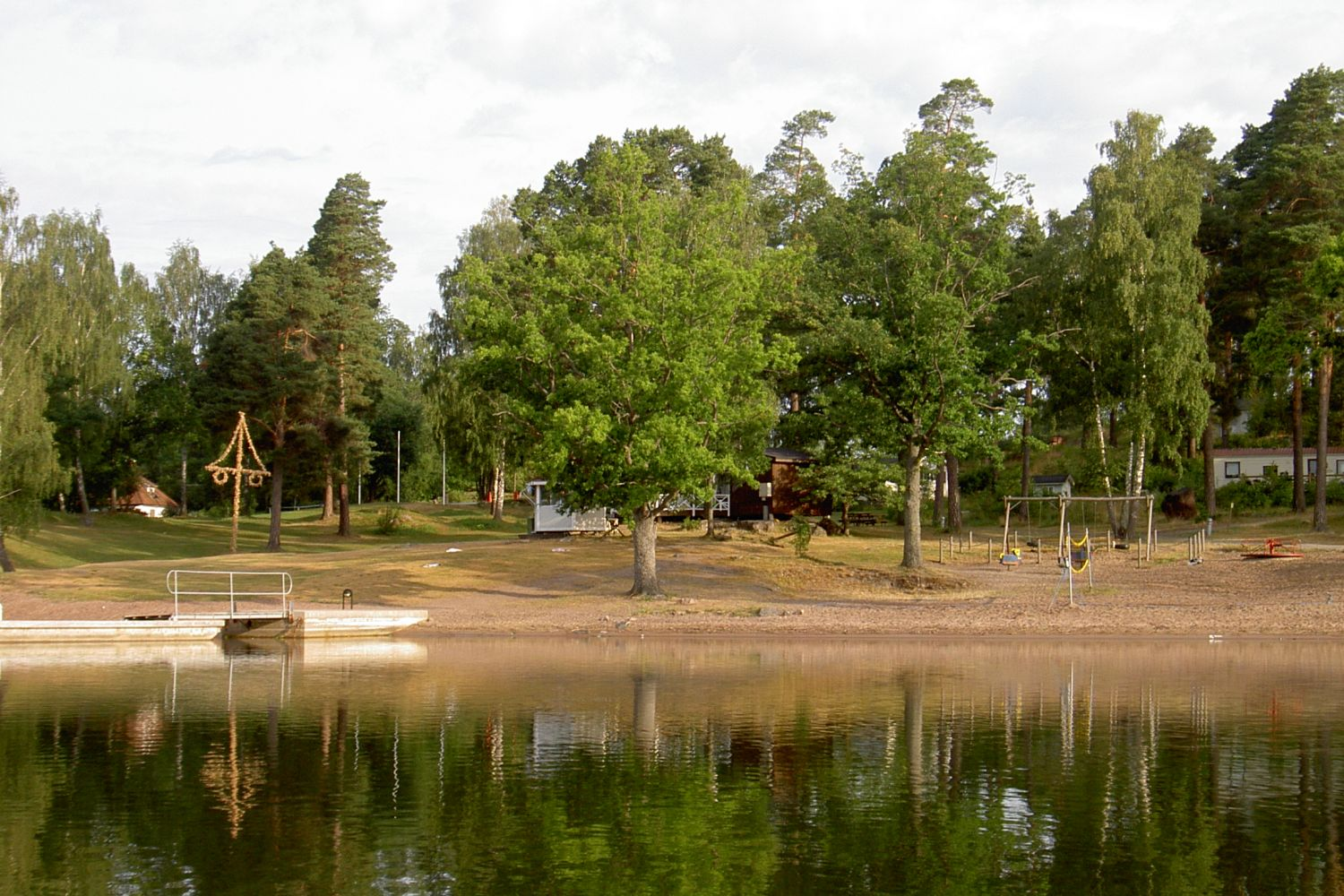 Hammarsbadet, Gamleby, en tidig morgon med vy från gamlebyviken.